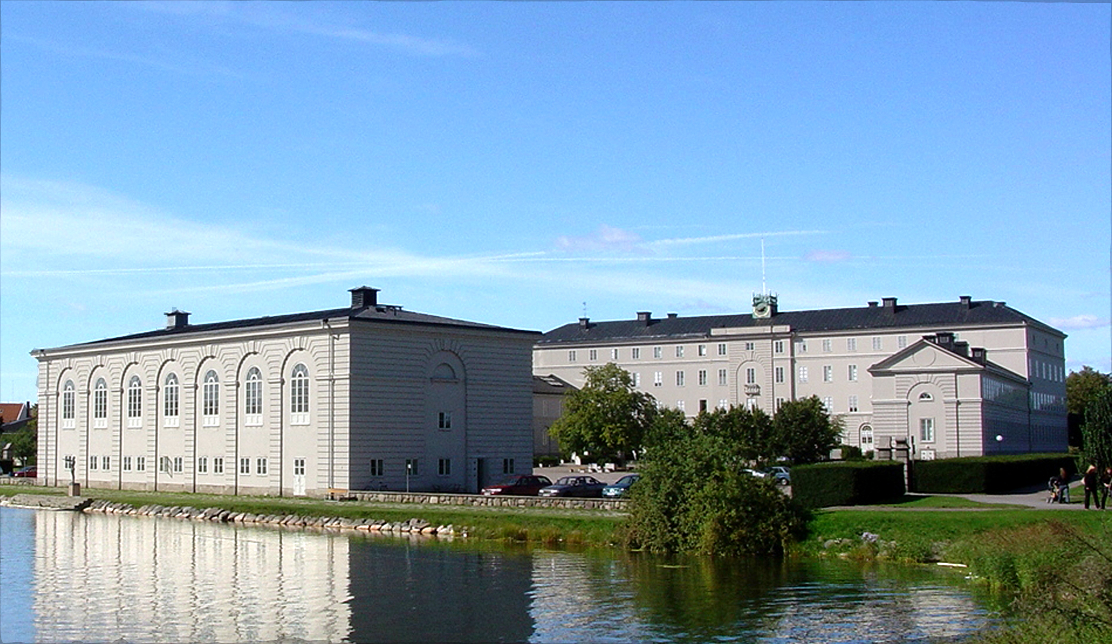 Stagneliusskolan, gymnasieskola i Kalmar